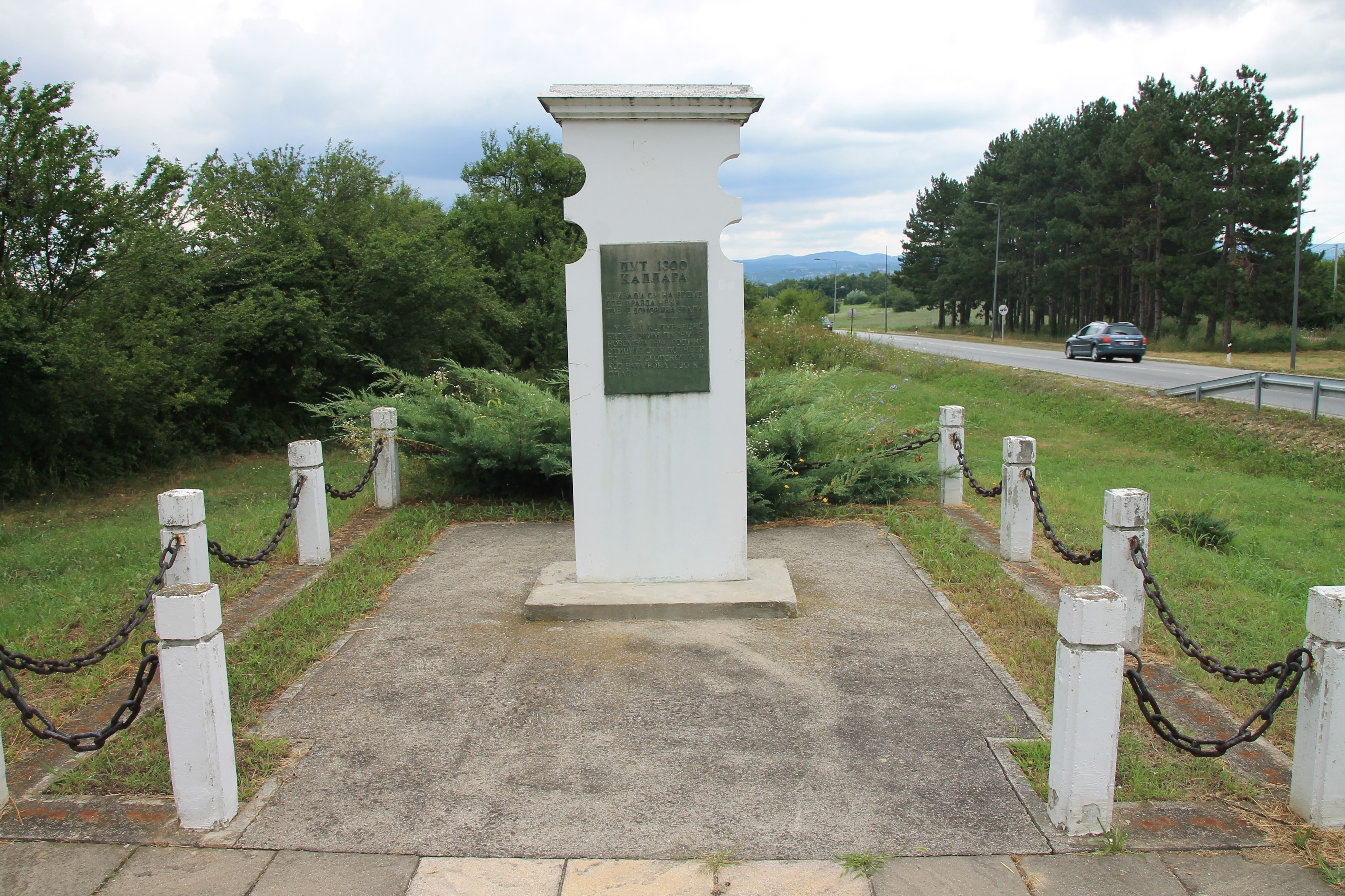 Spomenik Put 1300 kaplara